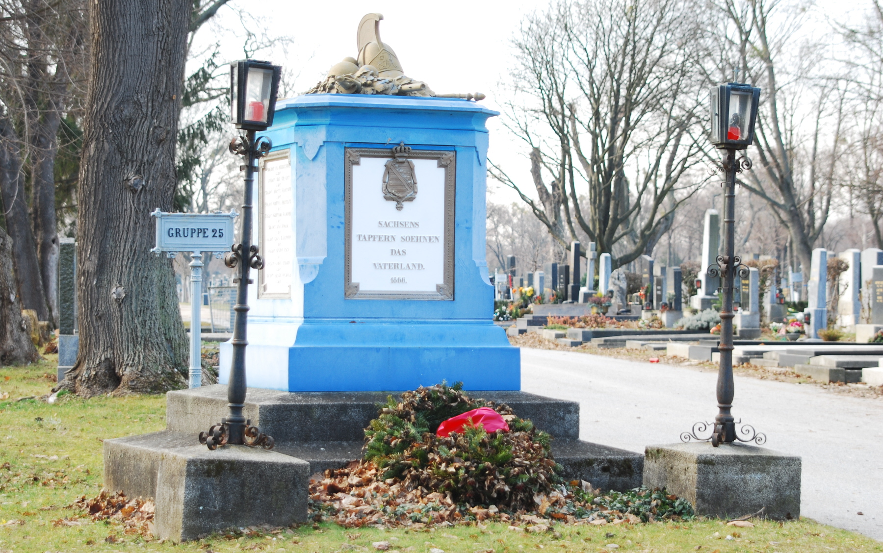 Die Gruppe 25 auf dem Wiener Zentralfriedhof in Wien-Simmering als Standort der Sachsengräber für 1866 in Wien verstorbene Angehörige der sächsischen Armee